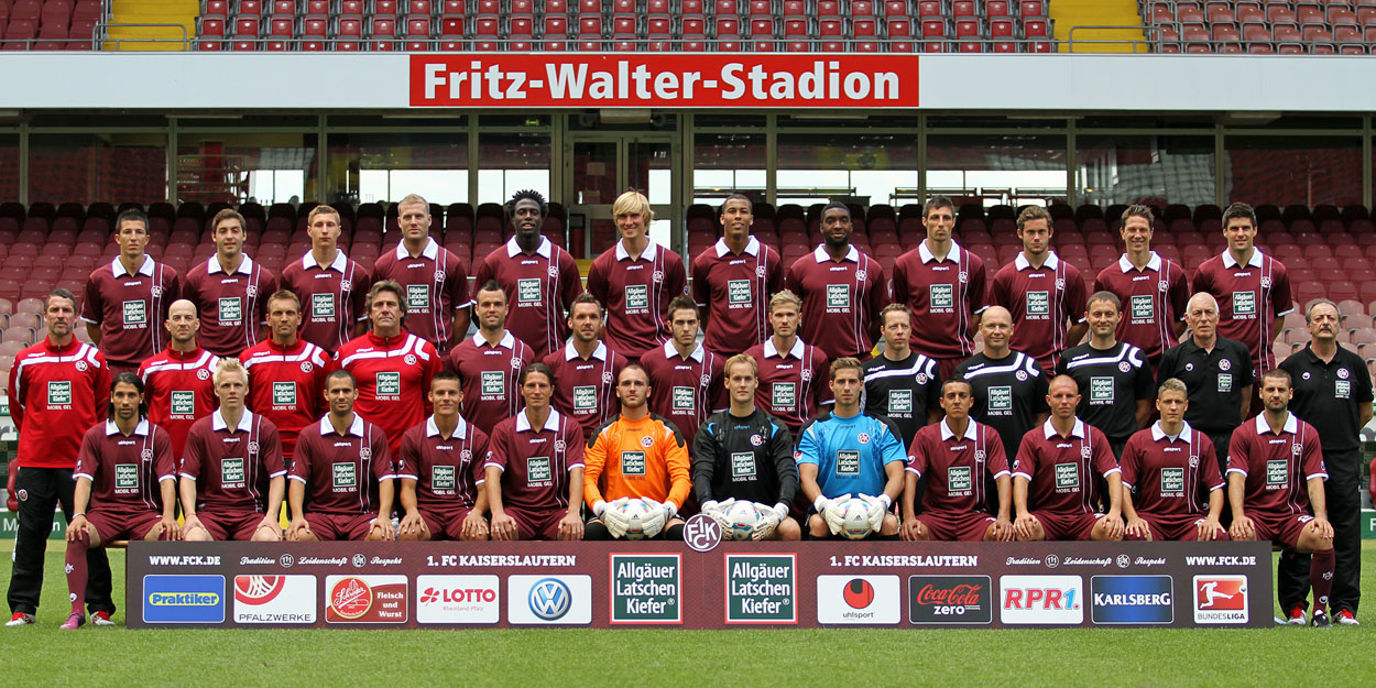 Die Bundesligamannschaft des FCK in der Saison 2011/12